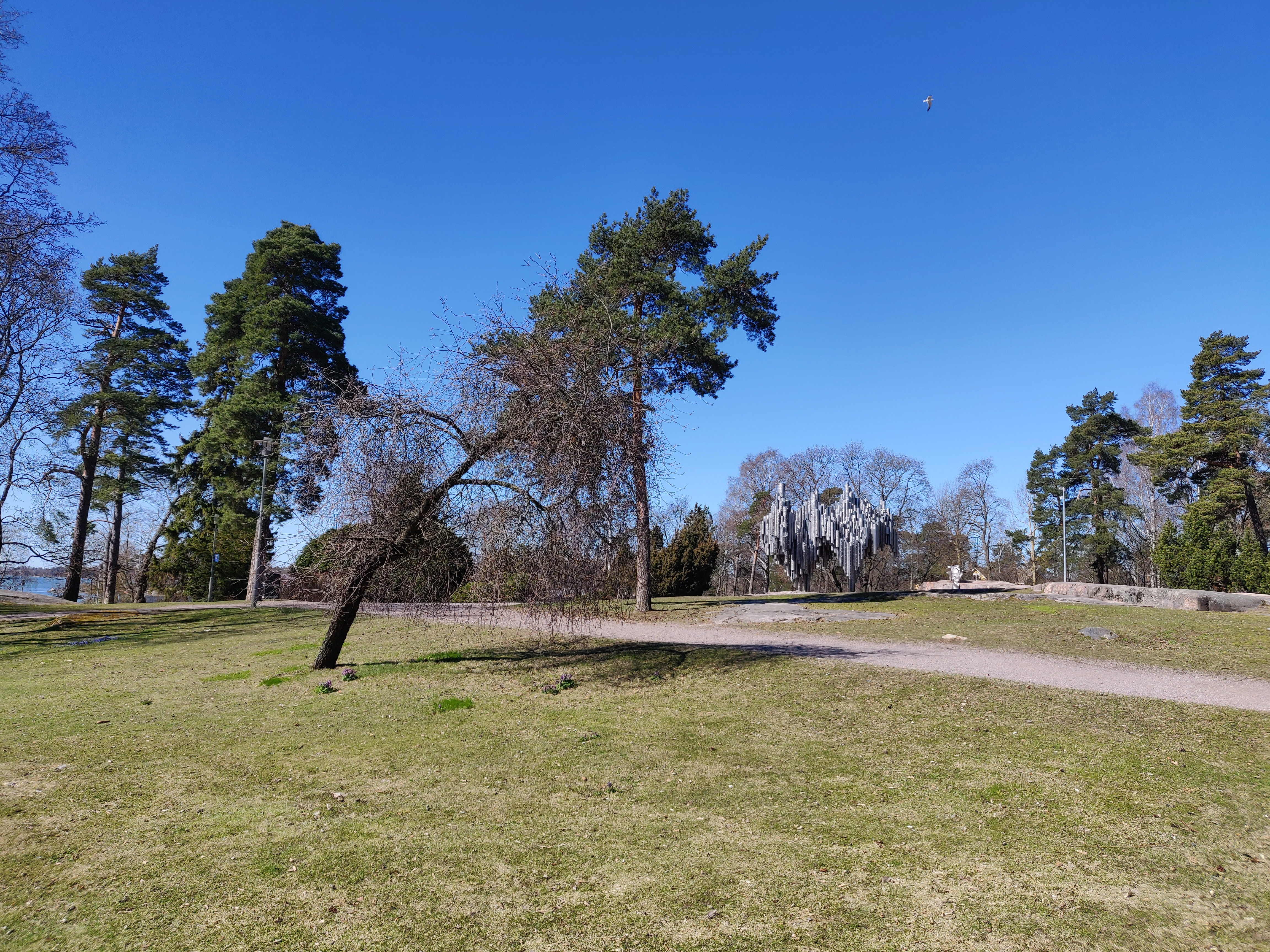 Bilden visar Sibeliusparken i Helsingfors i april 2020.